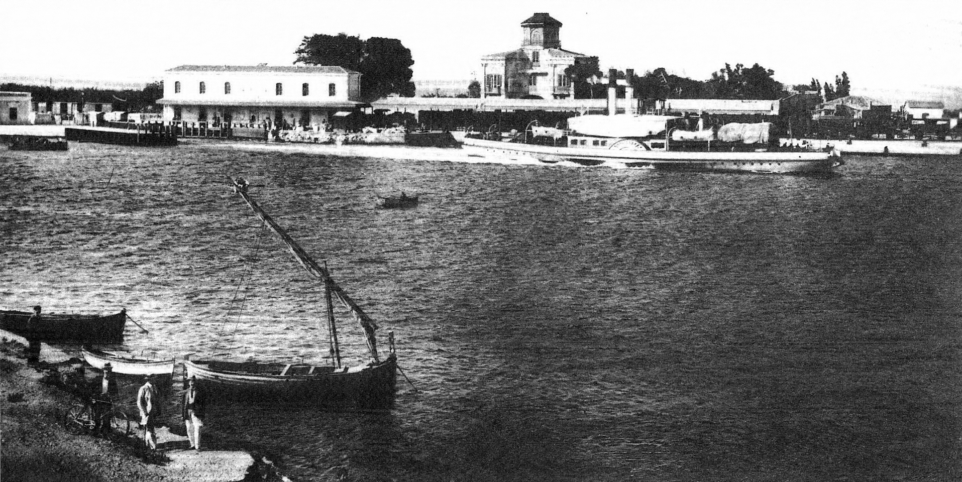 old postcard of Reggio Calabria